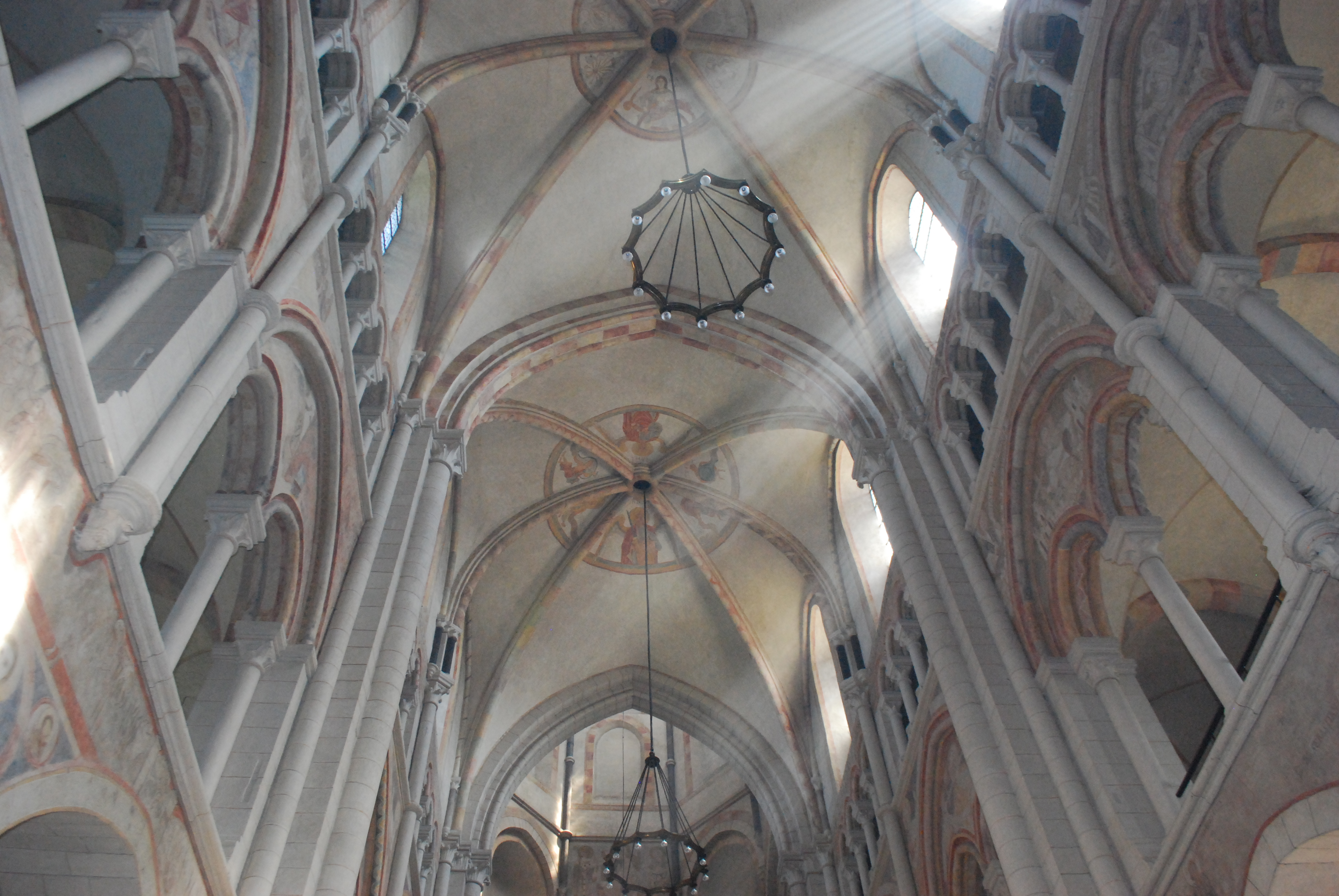 Vue de la voûte de la cathédrale de Limburg.